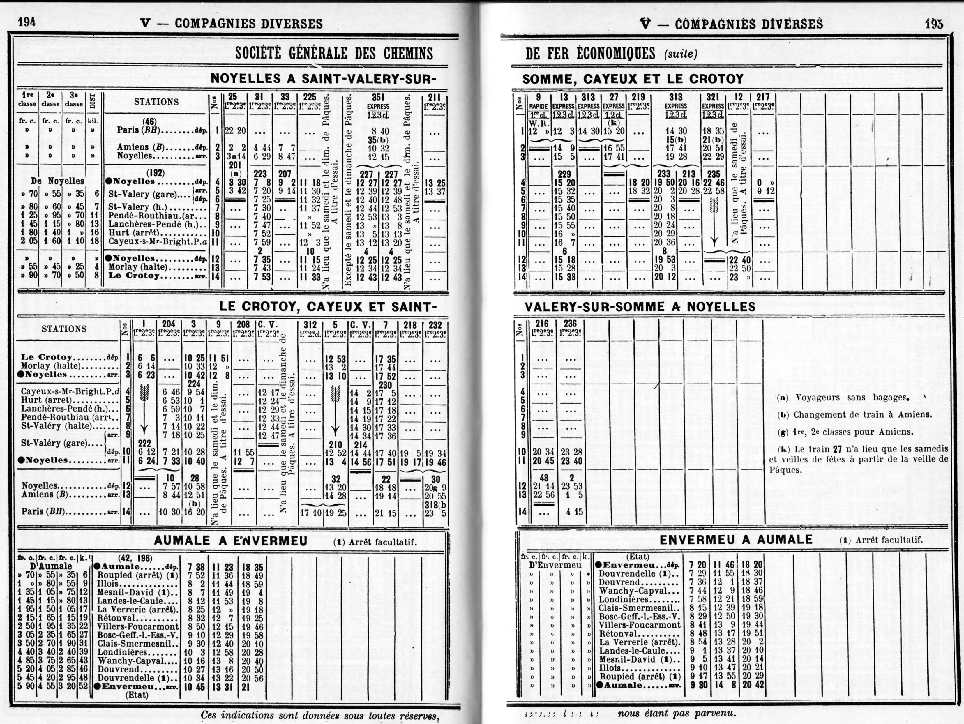 Tableau horaire de la ligne Noyelles - Saint-Valéry - Cayeux- Le Crotoy Ligne dite "des Bains de Mer" des Chemins de fer économiques (SE) Exploitée aujourd'hui par le CFBS